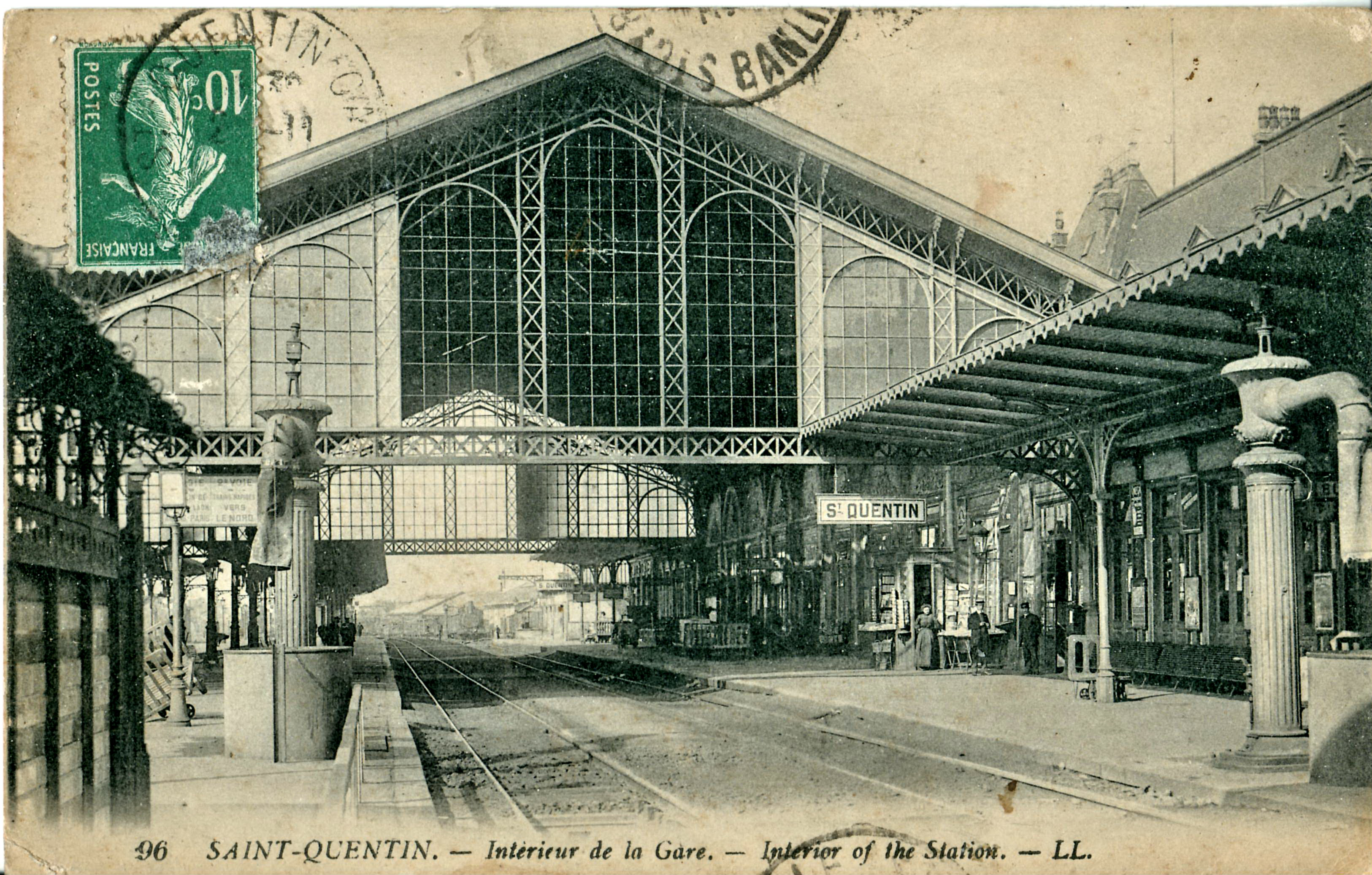 Carte postale ancienne éditée par LL, N° 96 Saint-Quentin : Intérieur de la Gare de Saint-QuentinGare